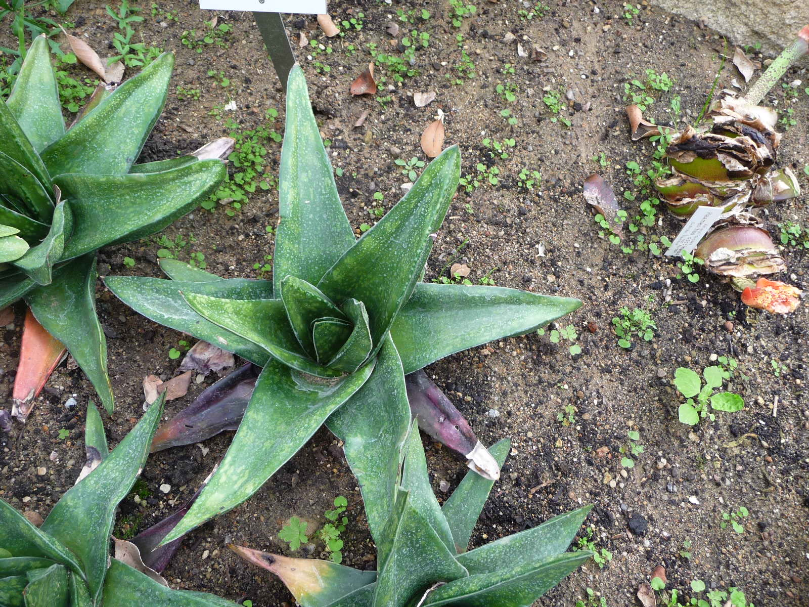 Gasteria nitida (Hamburgi pálmaház)